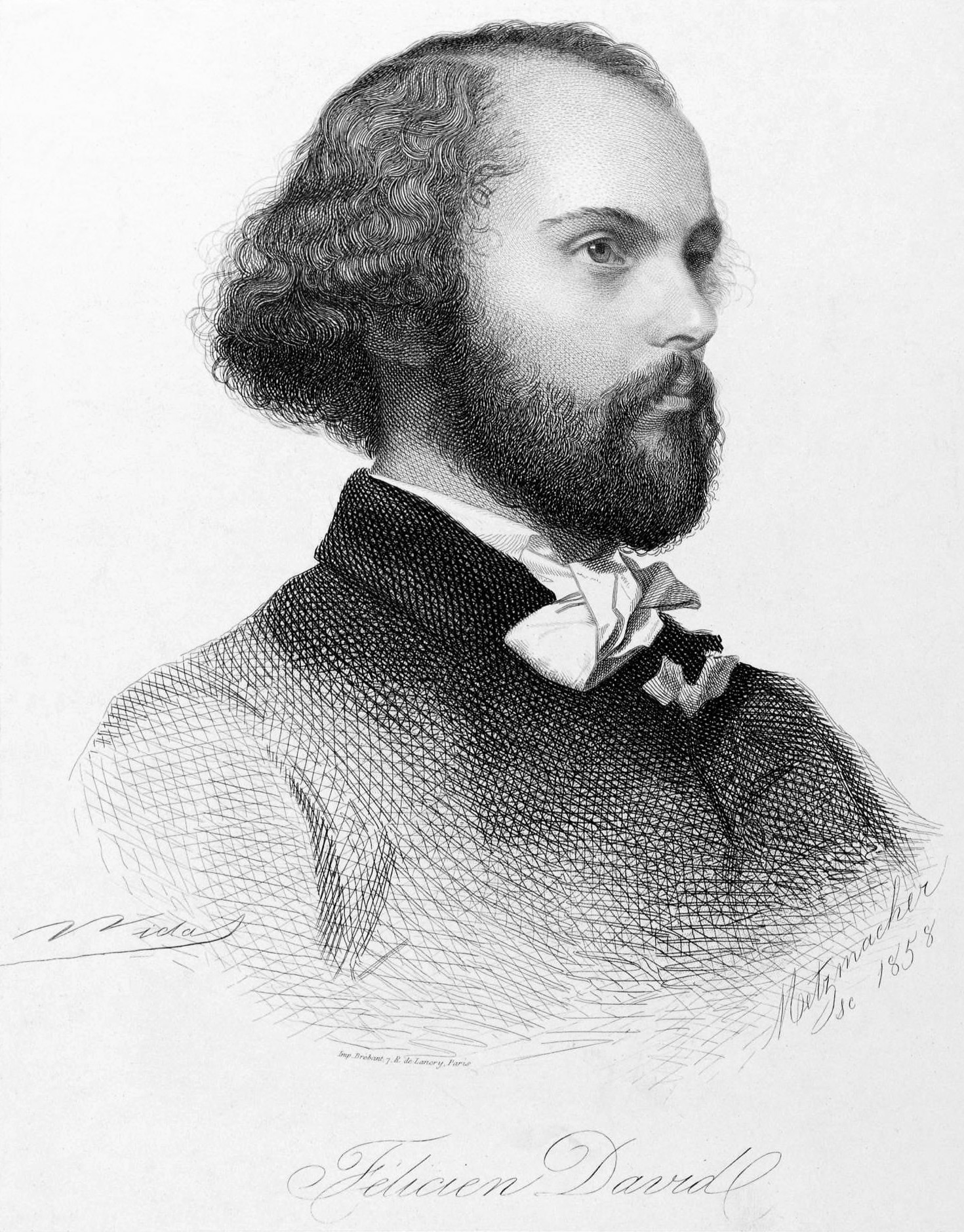 Félicien-César David (1810-1876), French composer